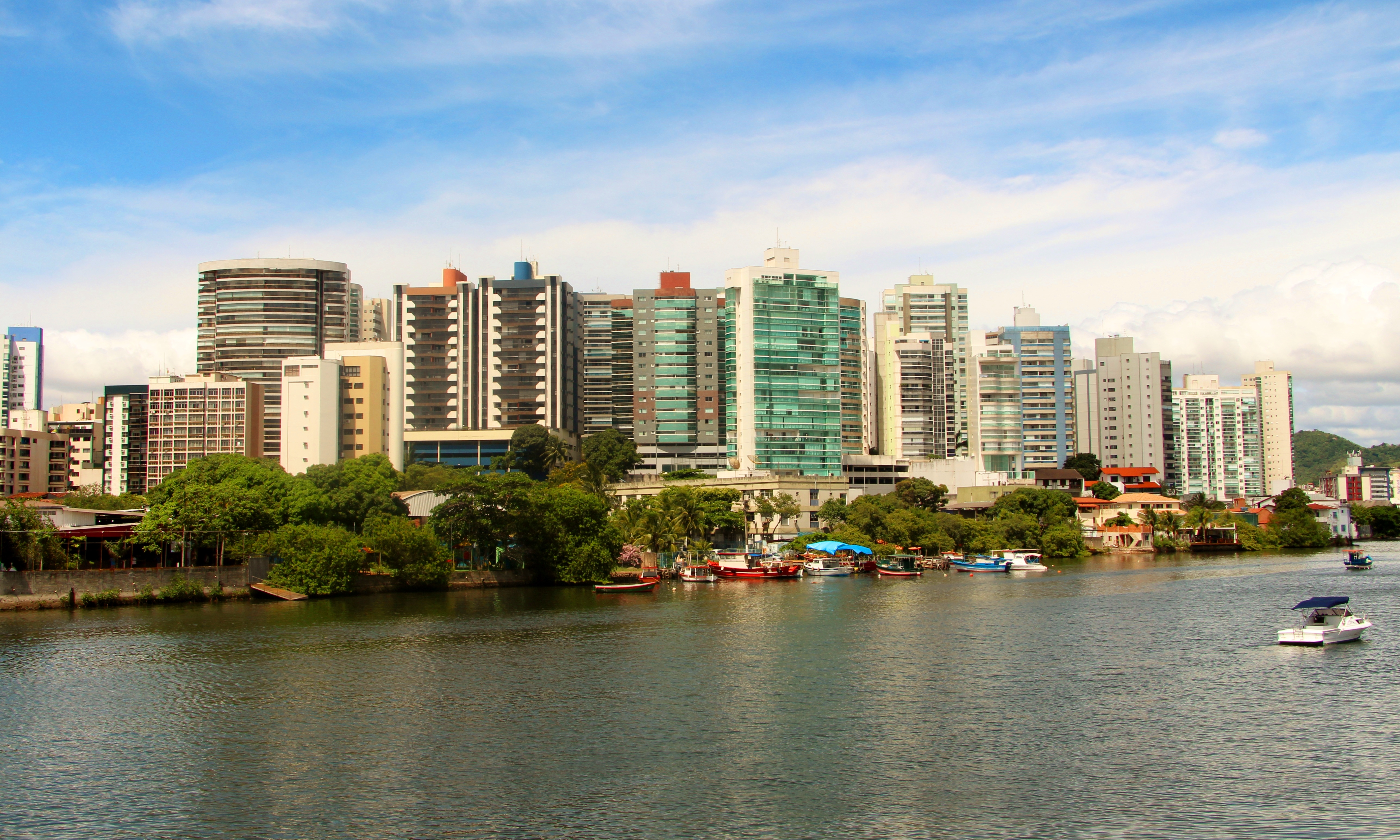 Canal de Camburi - Praia do Canto, Vitória-ES Brasil